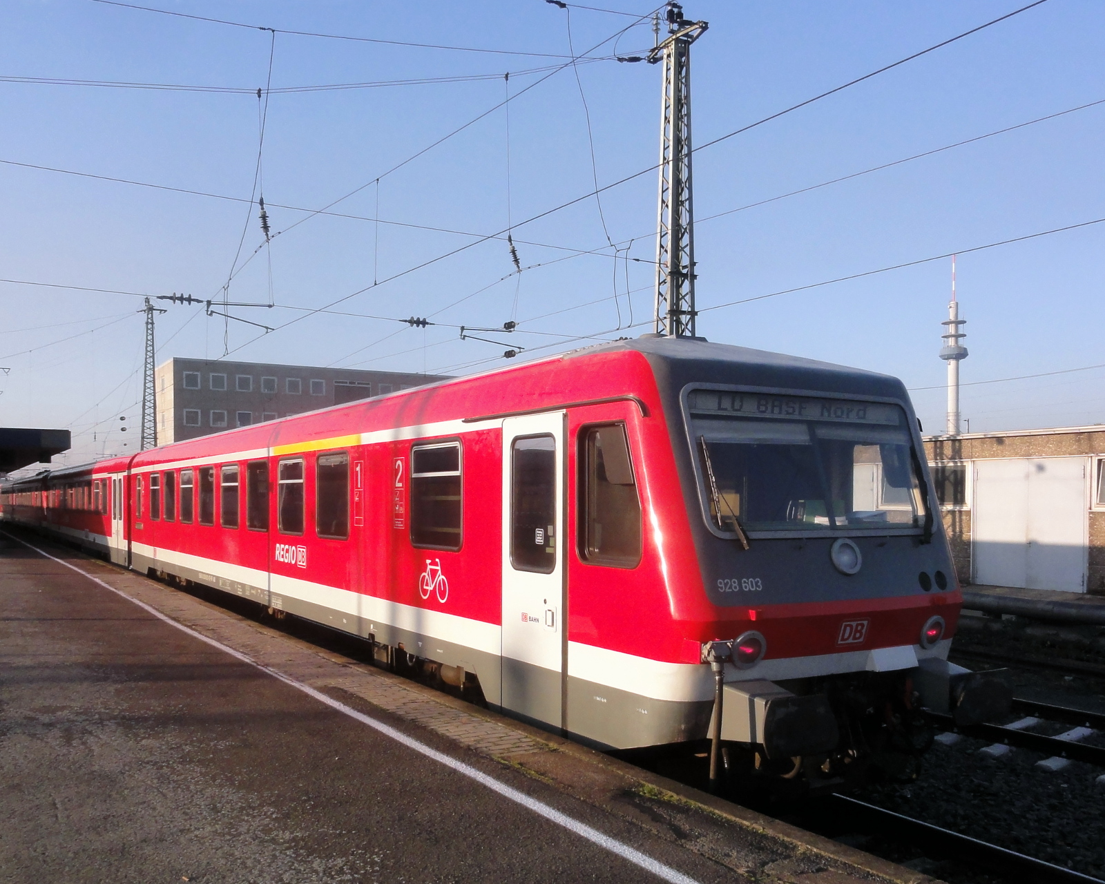 628 307 und 628 603 kurz nach der Ankunft als Leerzug aus Ludwigshafen BASF Nord.